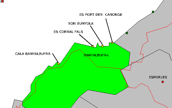 M Banyalbufar playas